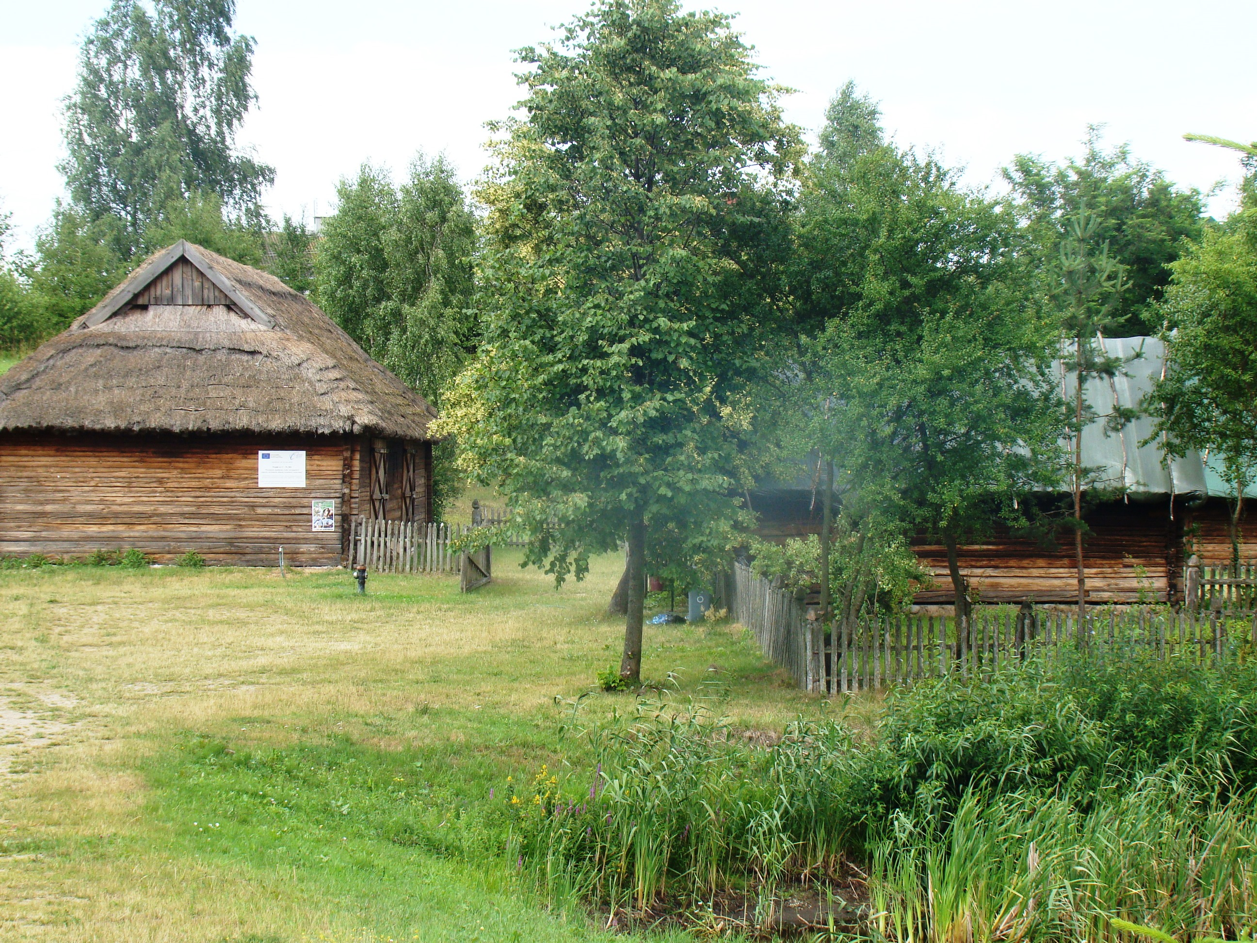 Puńsk skansen